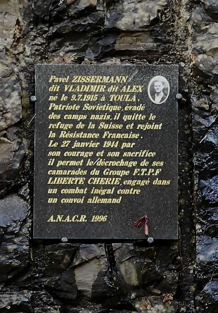 Stèle située à l'entrée de la gorge des "Etroits".